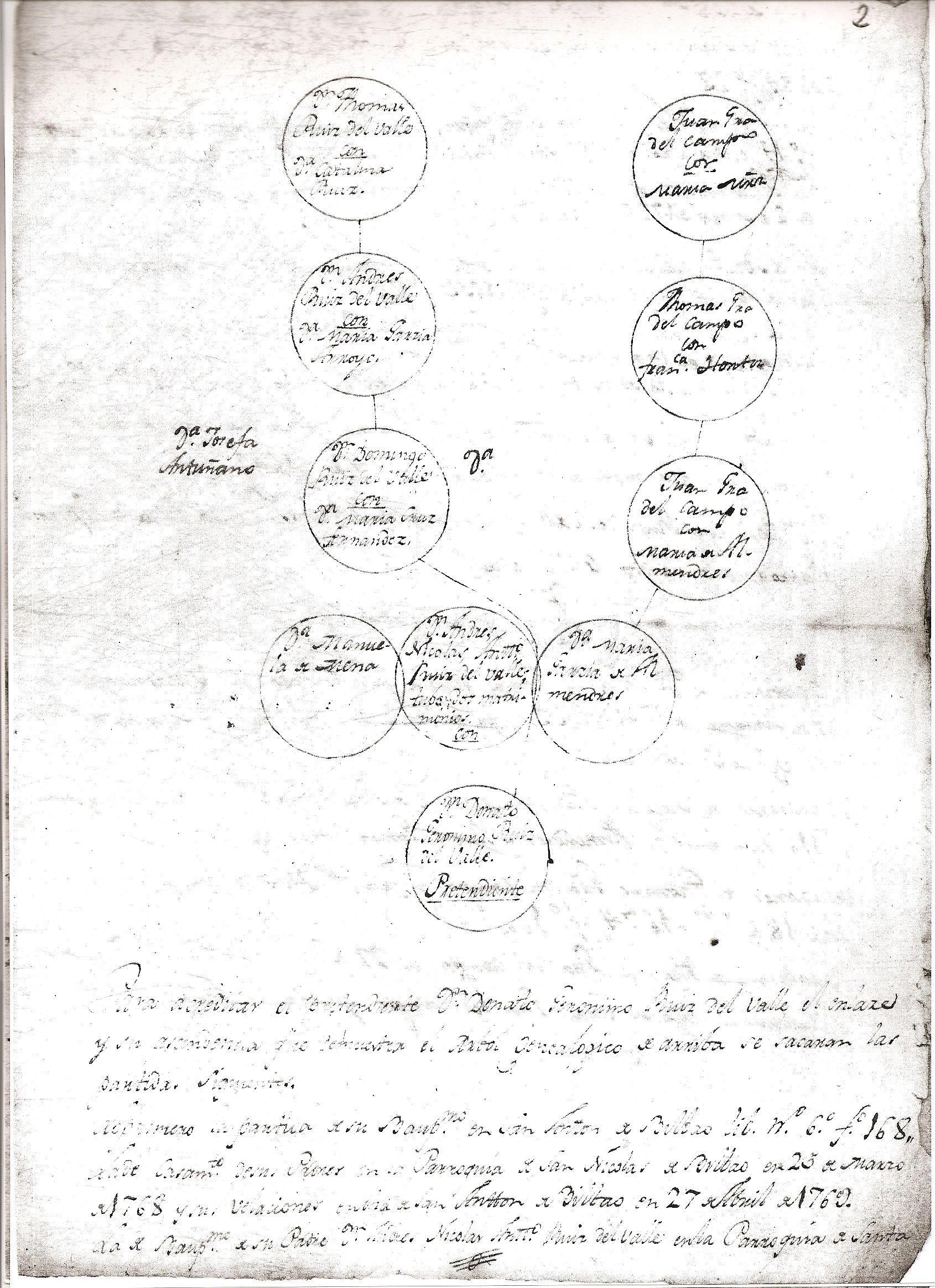 Información de hidalguia de Domingo Ruiz del Valle